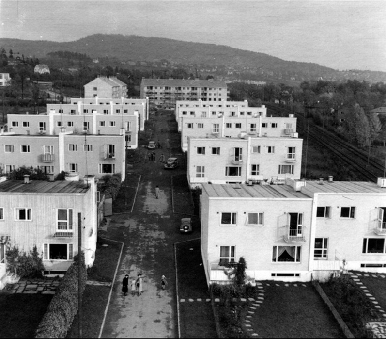 Gjennomfaret, 1950